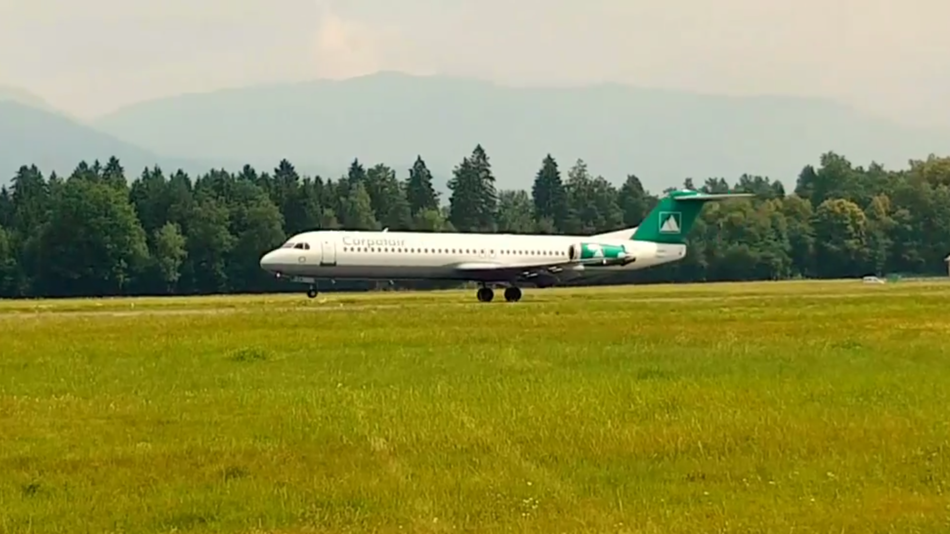 Fokker 100 med pristankom na letališču